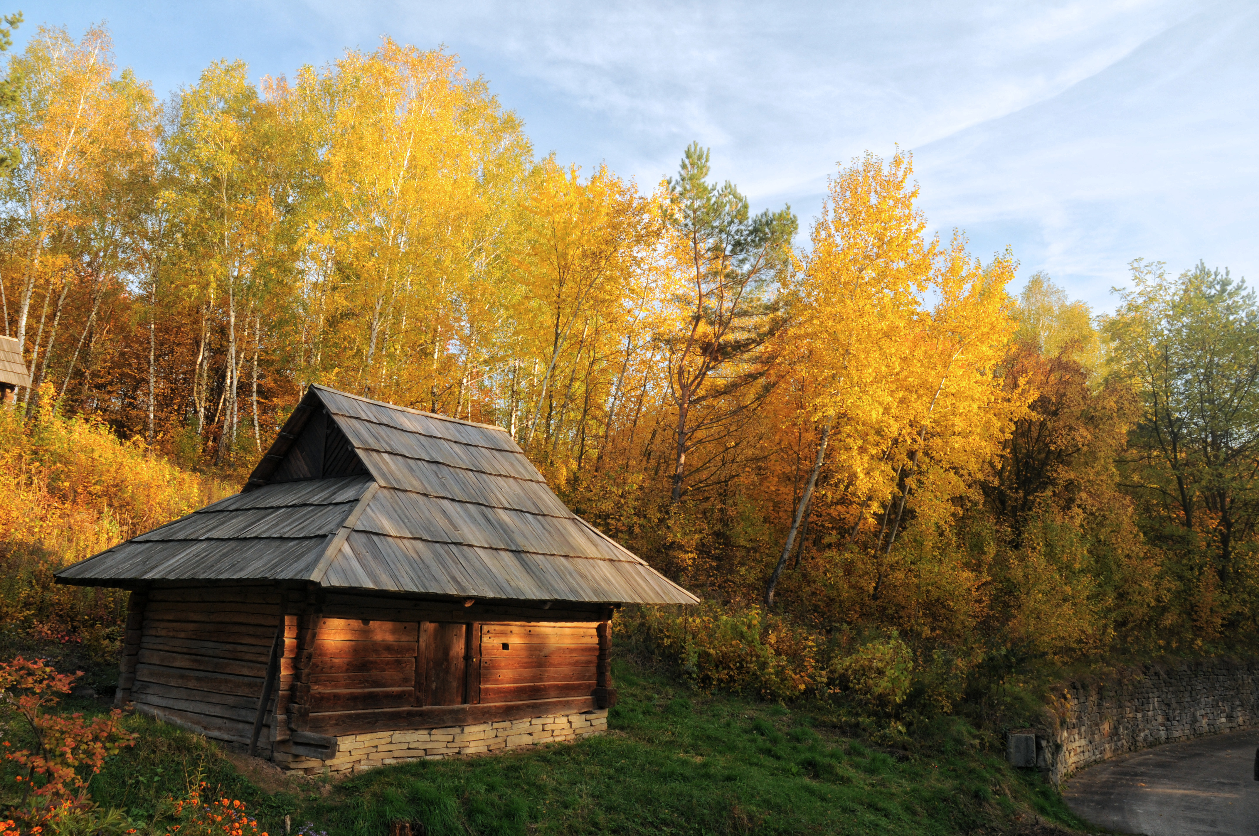 Пирогів, скансен, комора з Верх.Ясенова